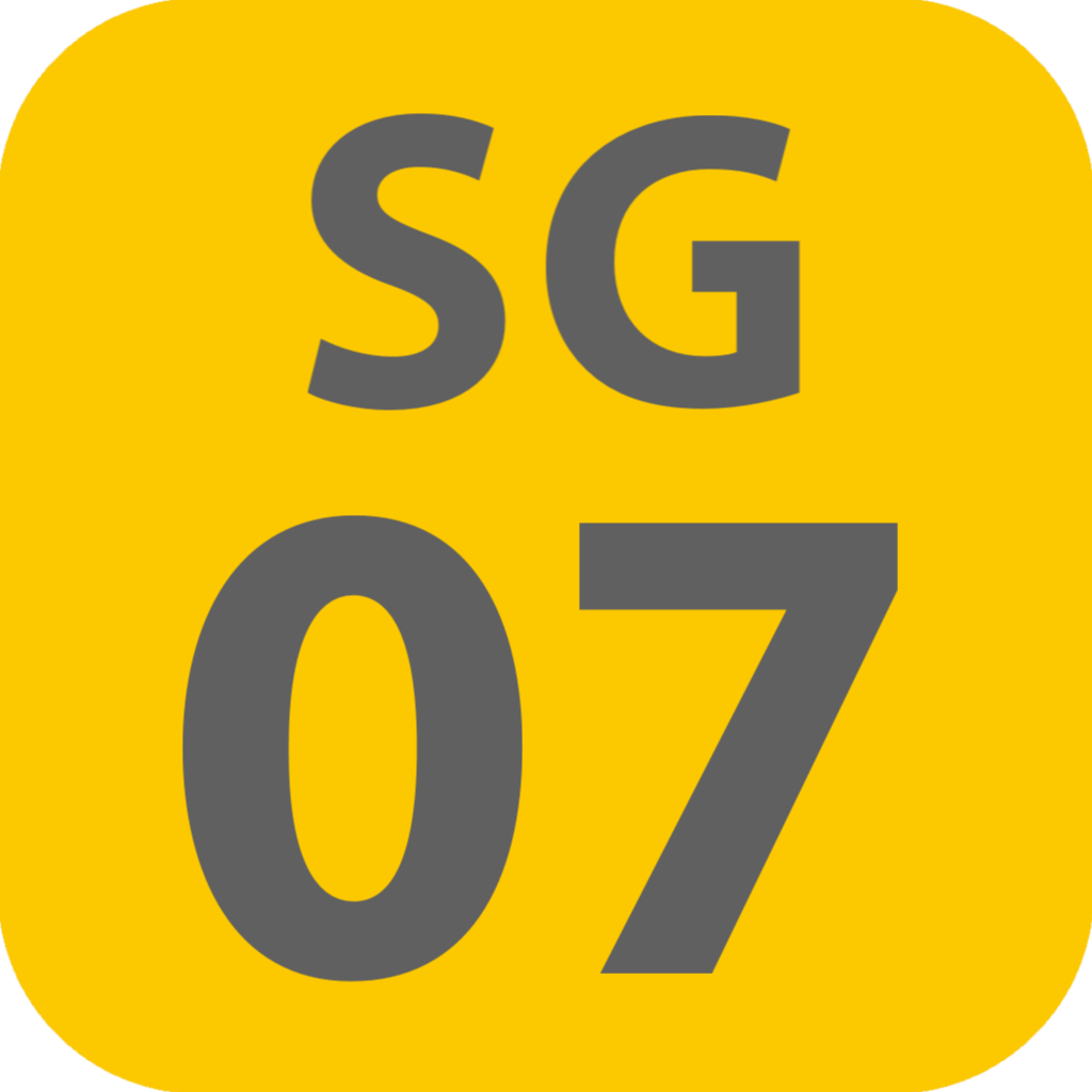 世田谷線の宮の坂の駅ナンバリング記号